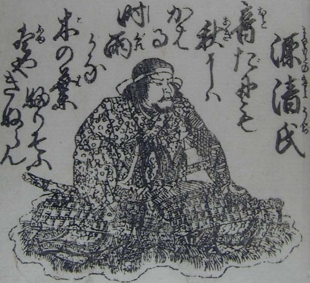 kiyouji_hosokawa